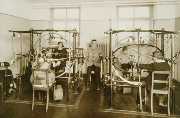 Меридіан (апарат): "Меридіан", універсальний механотерапевтичний комплекс Richard Scherb, 1918 р.